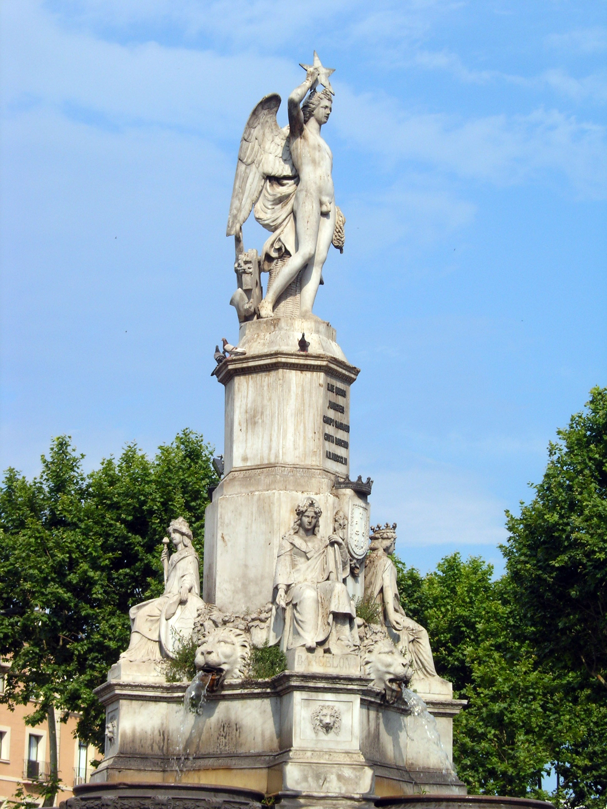 Font del Geni Català. Pla de Palau (Barcelona)